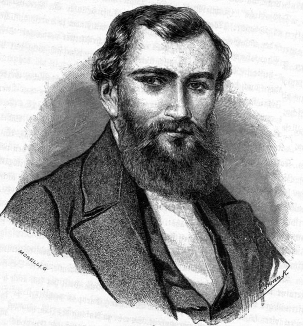 Erdélyi János (1814–1868). Morelli Gusztáv fametszete. Megjelent Az Osztrák-Magyar Monarchia írásban és képben (1887–1901) kiadványban